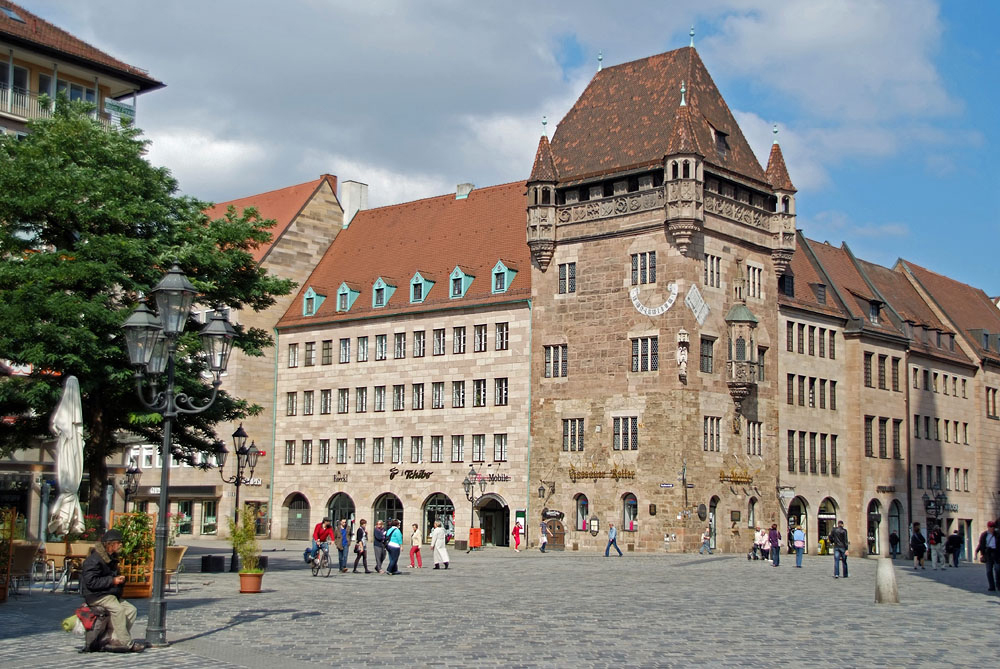 Nassauer Haus Nürnberg